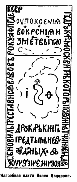 Надгробная плита Ивана Фёдорова